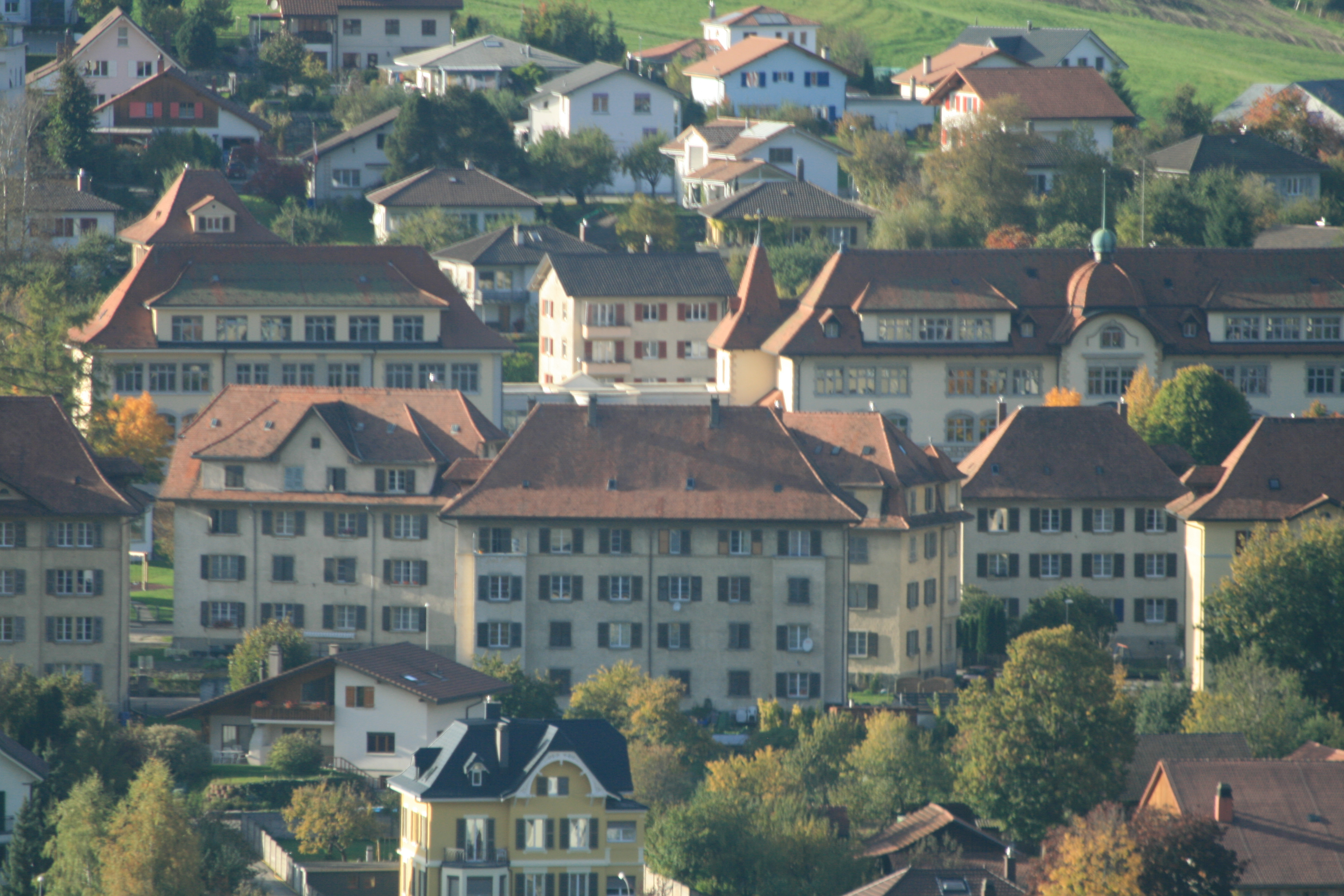 Tavannes